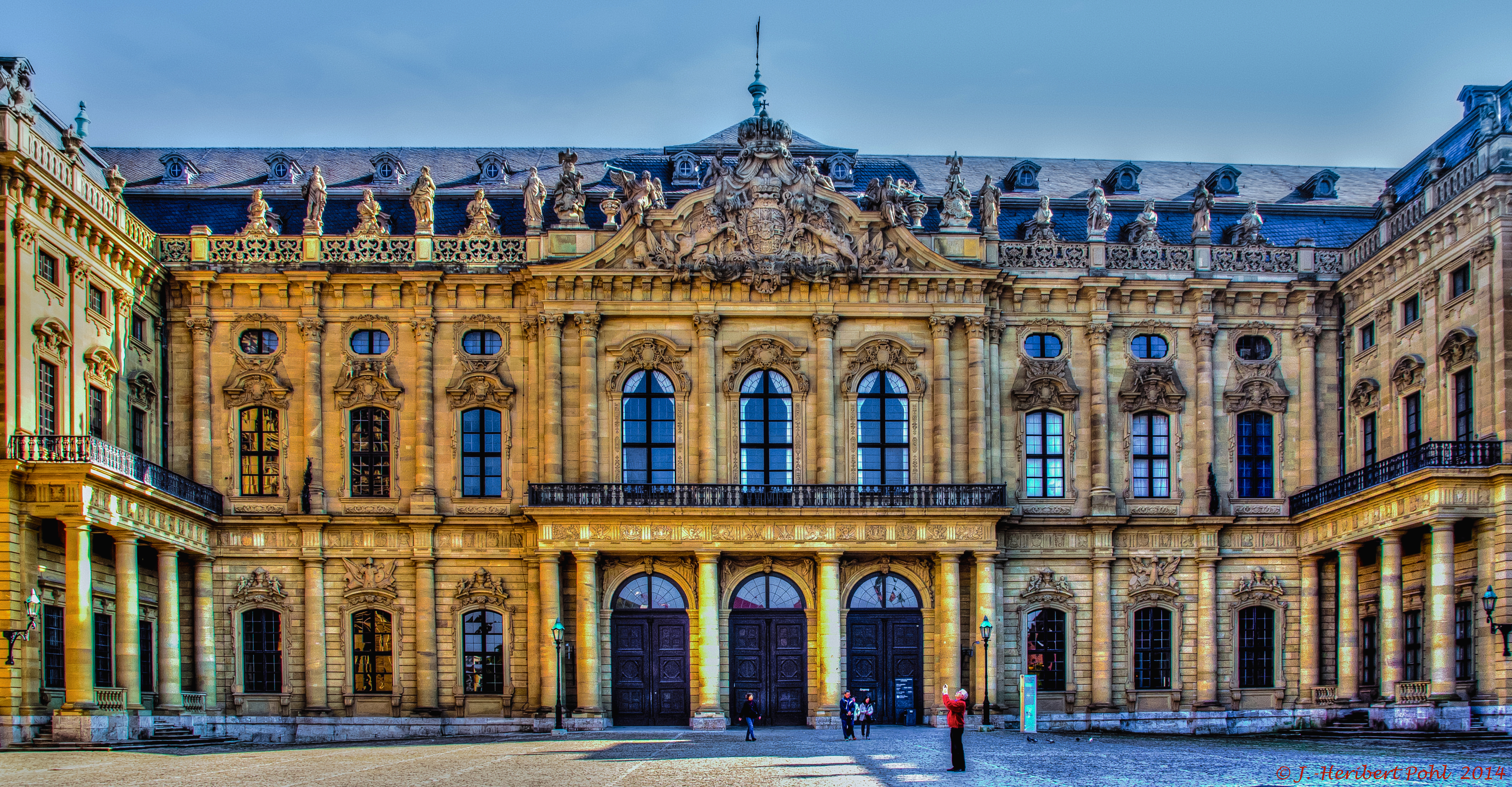 Die im Stil des Barocks gebaute Würzburger Residenz wurde zwischen 1719 und 1744 im Auftrage von Johann Philipp Franz von Schönborn errichtet. Der Baumeister war Balthasar Neumann. Sie war der Sitz der Würzburger Fürstbischöfe. Im europäischen Kontext gilt es als einer der bedeutendsten Residenzbauten des Spätbarocks und steht mit einer Reihe mit Schlössern wie Schönbrunn (Wien) und Versailles. Seit 1881 gehört es zum Weldkulturerbe.